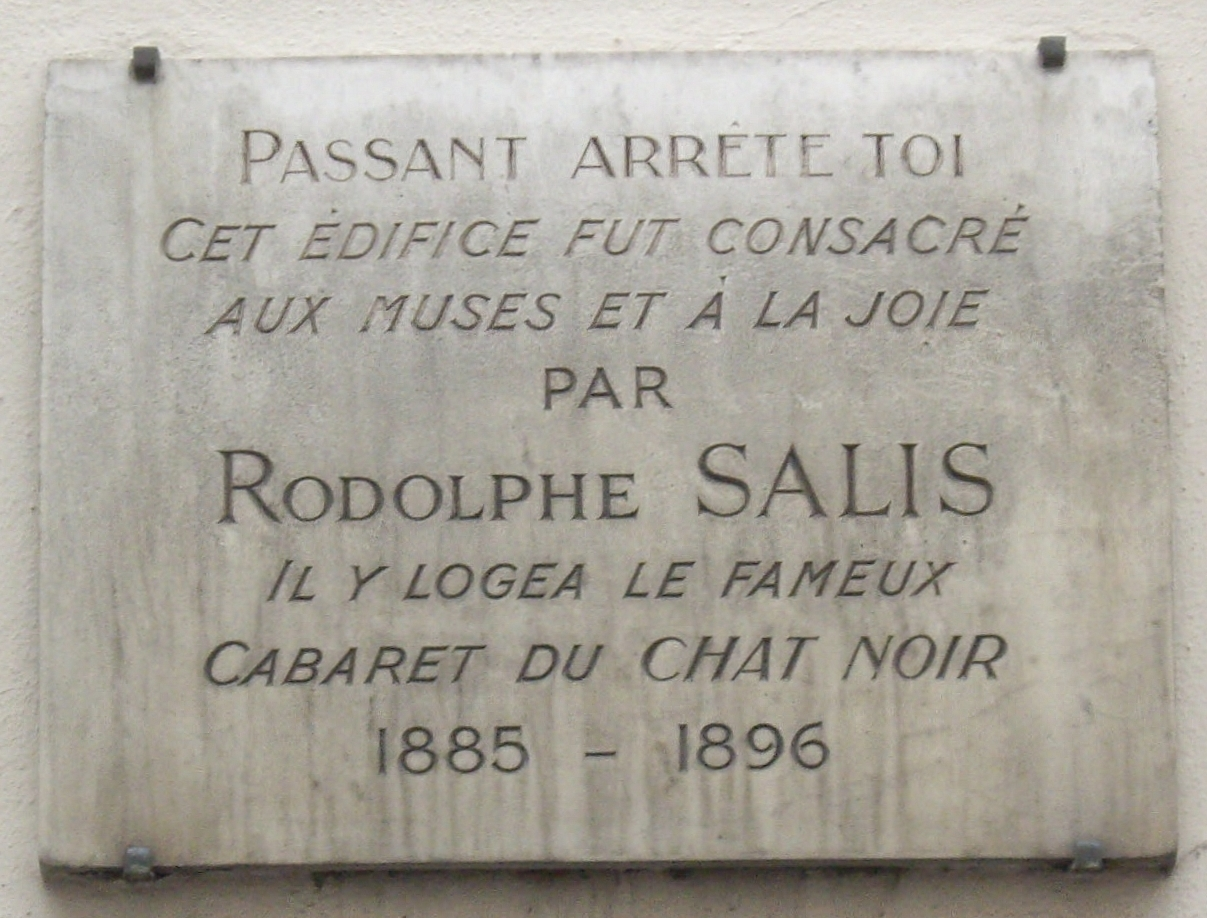 Plaque commémorative, 12 rue Victor-Massé, Paris 9e. « Passant, arrête-toi. Cet édifice fut consacré aux muses et à la joie par Rodolphe Salis. Il y logea le fameux cabaret du Chat noir, 1885-1896. »